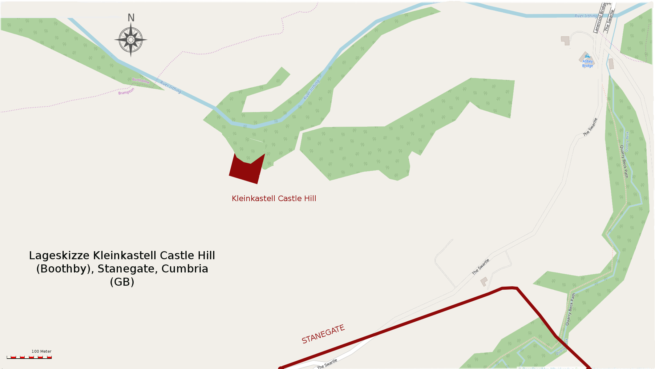 Lageskizze des Kleinkastell Castle Hill (Boothby) am Stanegate, Cumbria, GB, Befunde von 1933.